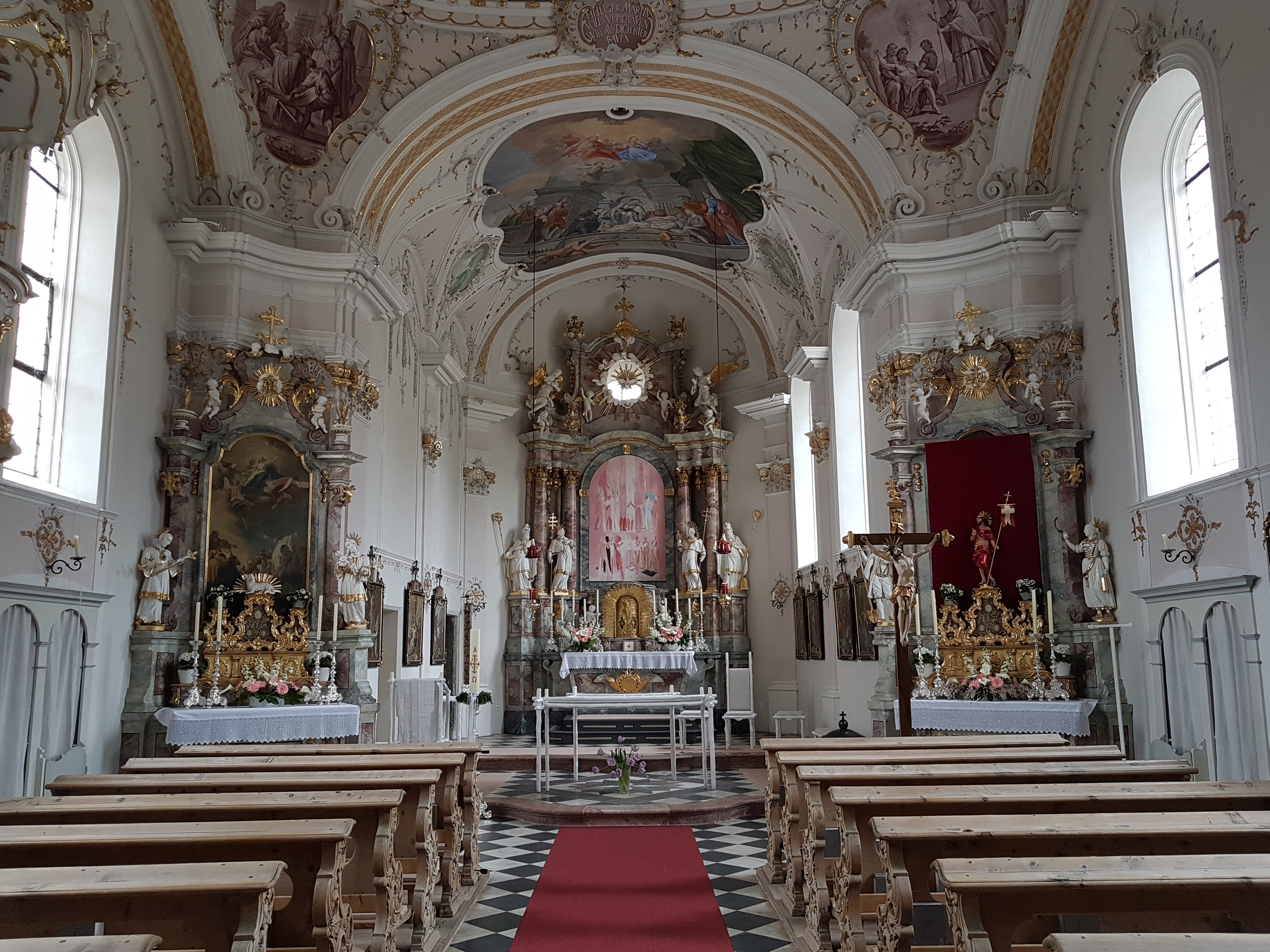 Vill, Pfarrkirche, Innenraum vom Gitter aus